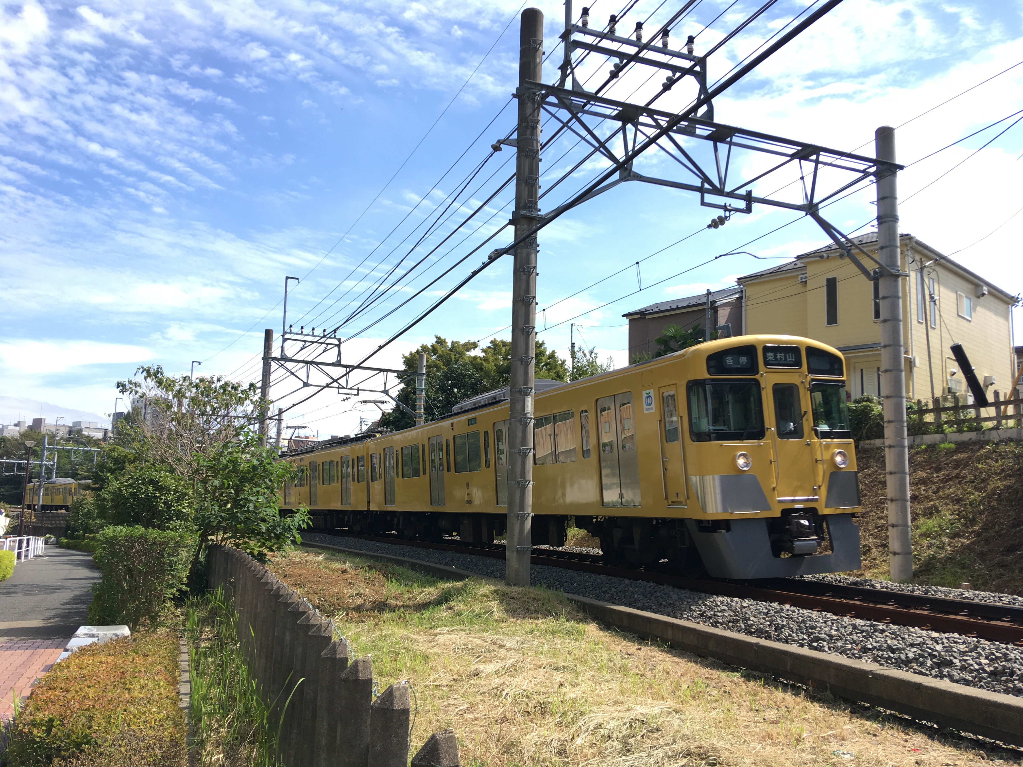 国分寺市の日立中央研究所沿いを国分寺駅から出発した電車